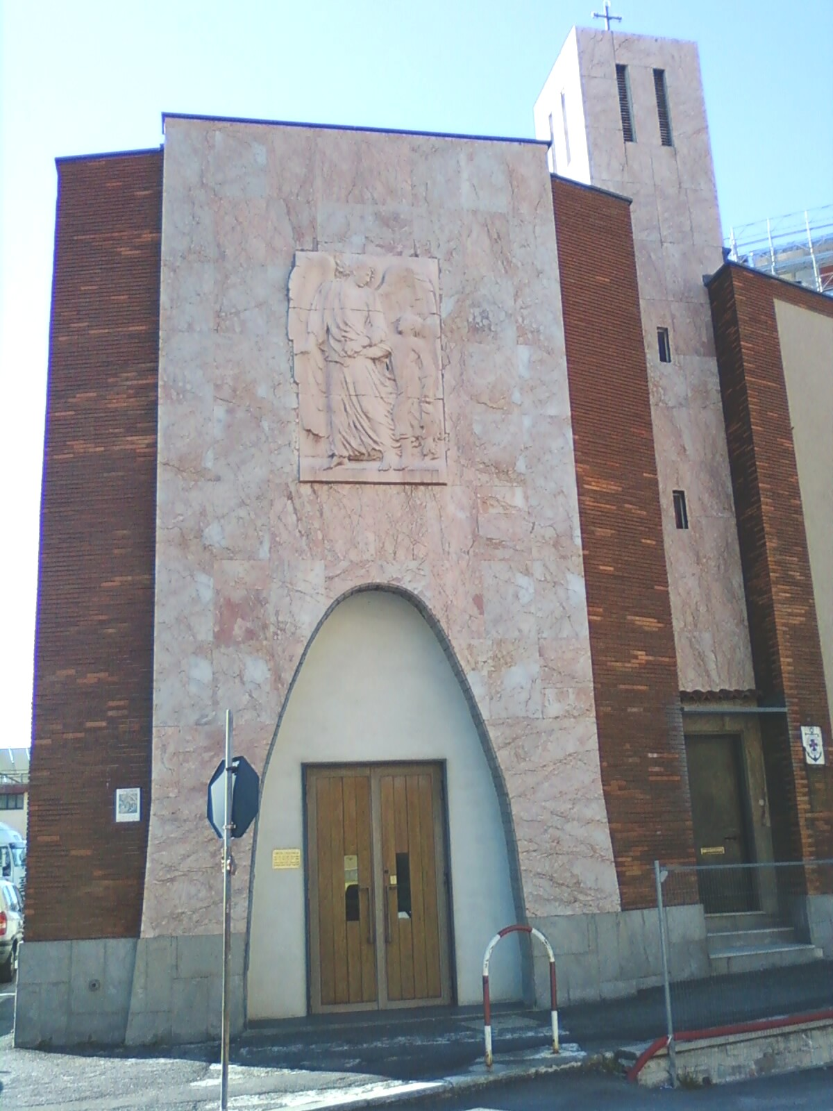 Chiesa di San Raffaele al porto in Savona (Italy)